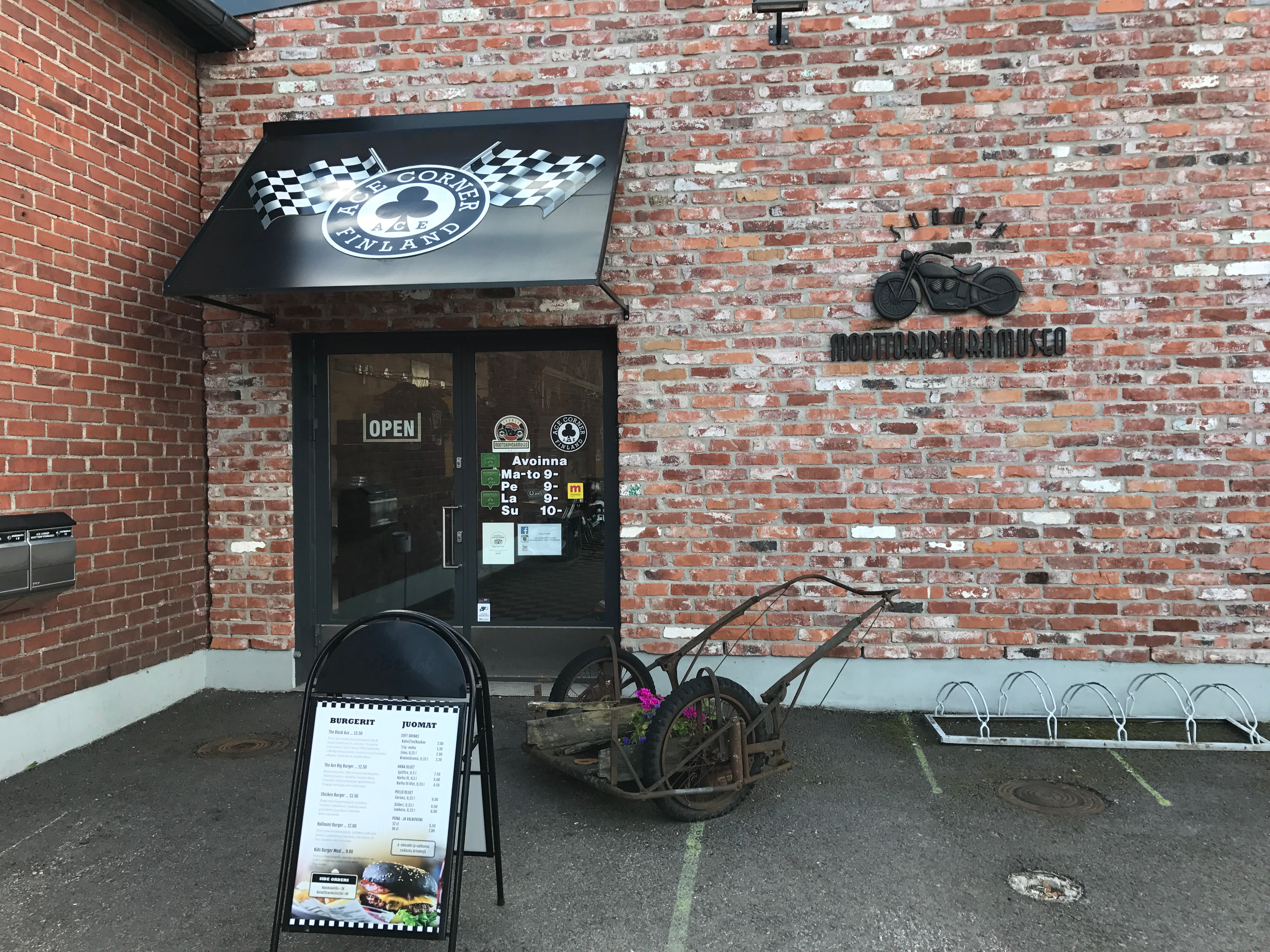 Suomen moottoripyörämuseo Niemen satamassa Lahdessa